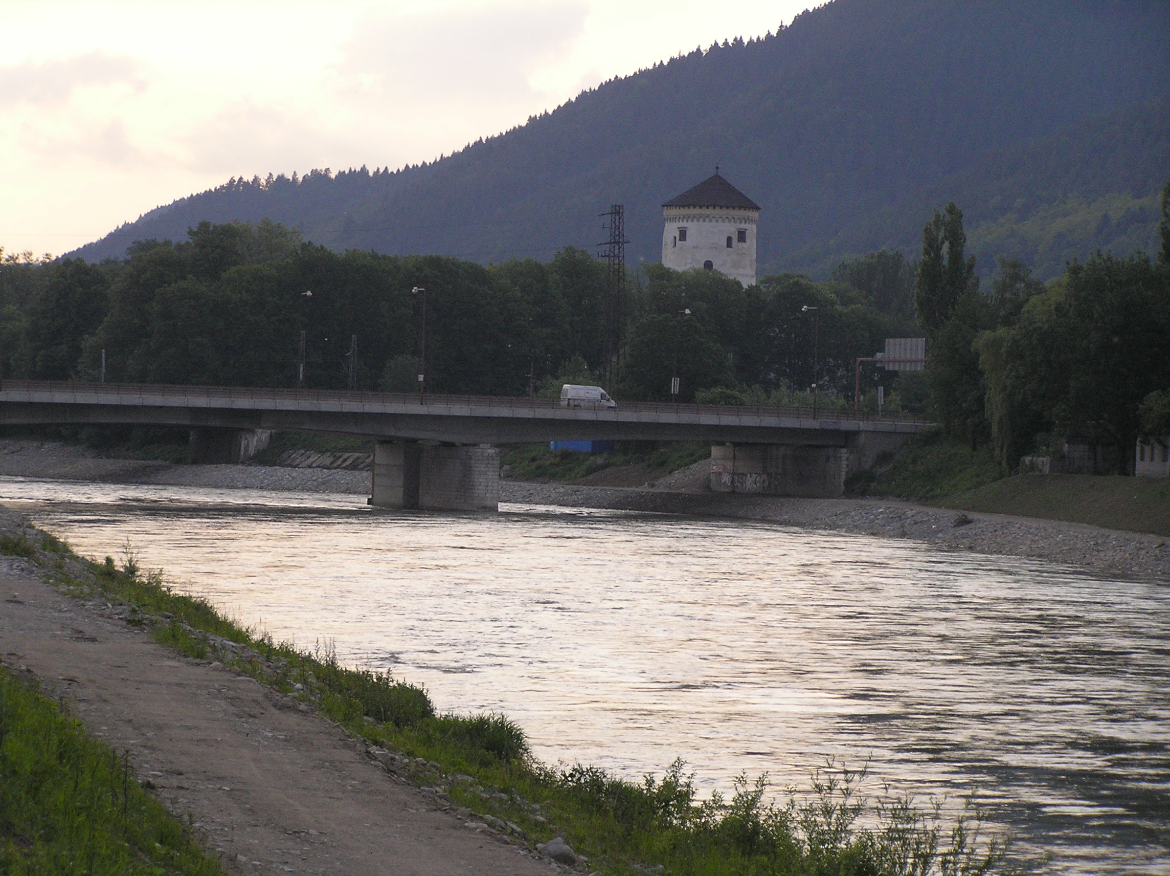 Koryto rieky Váh, Budatín neďaleko mosta, Žilina